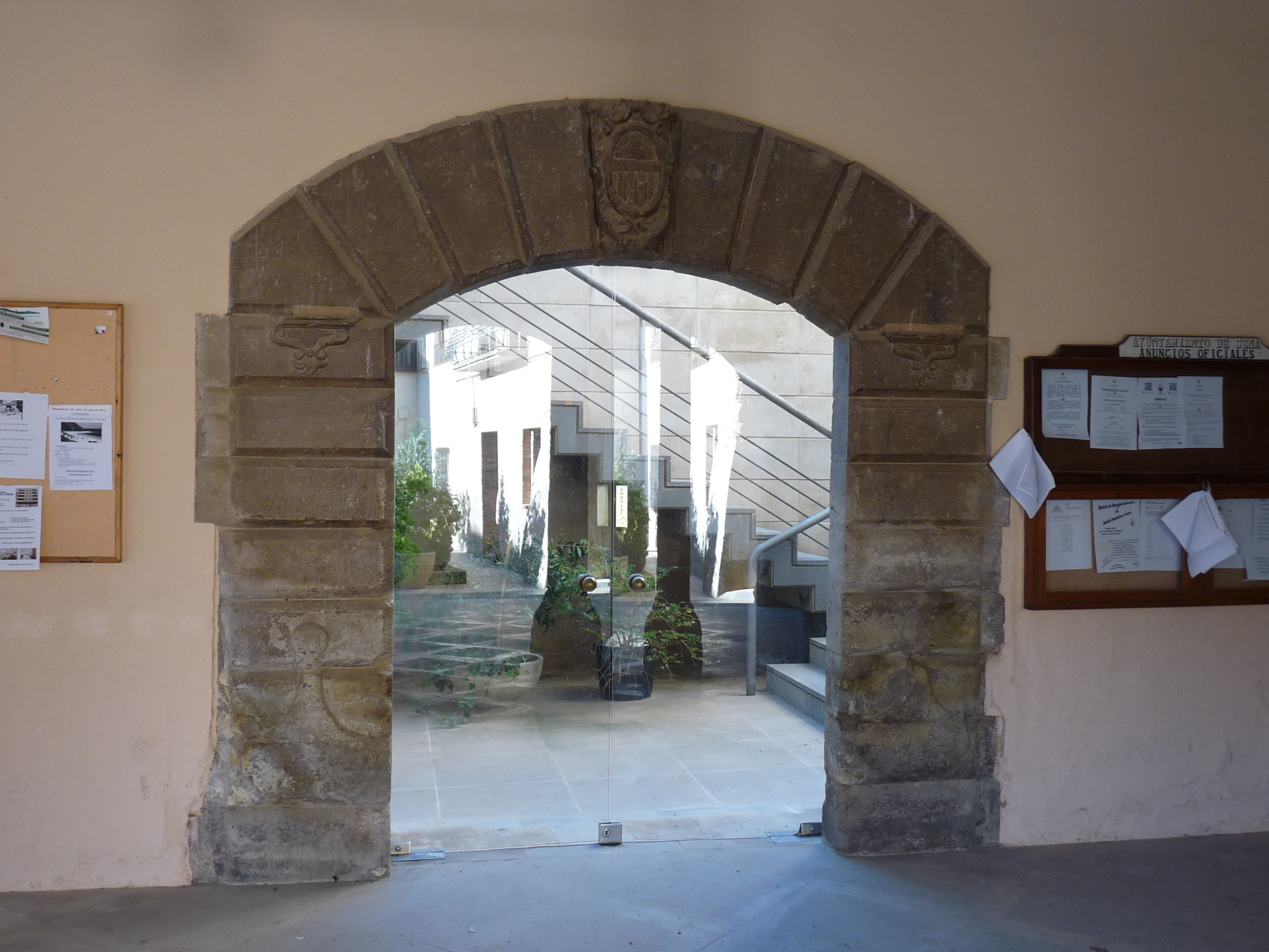 Sena - Ayuntamiento (1550-1575)